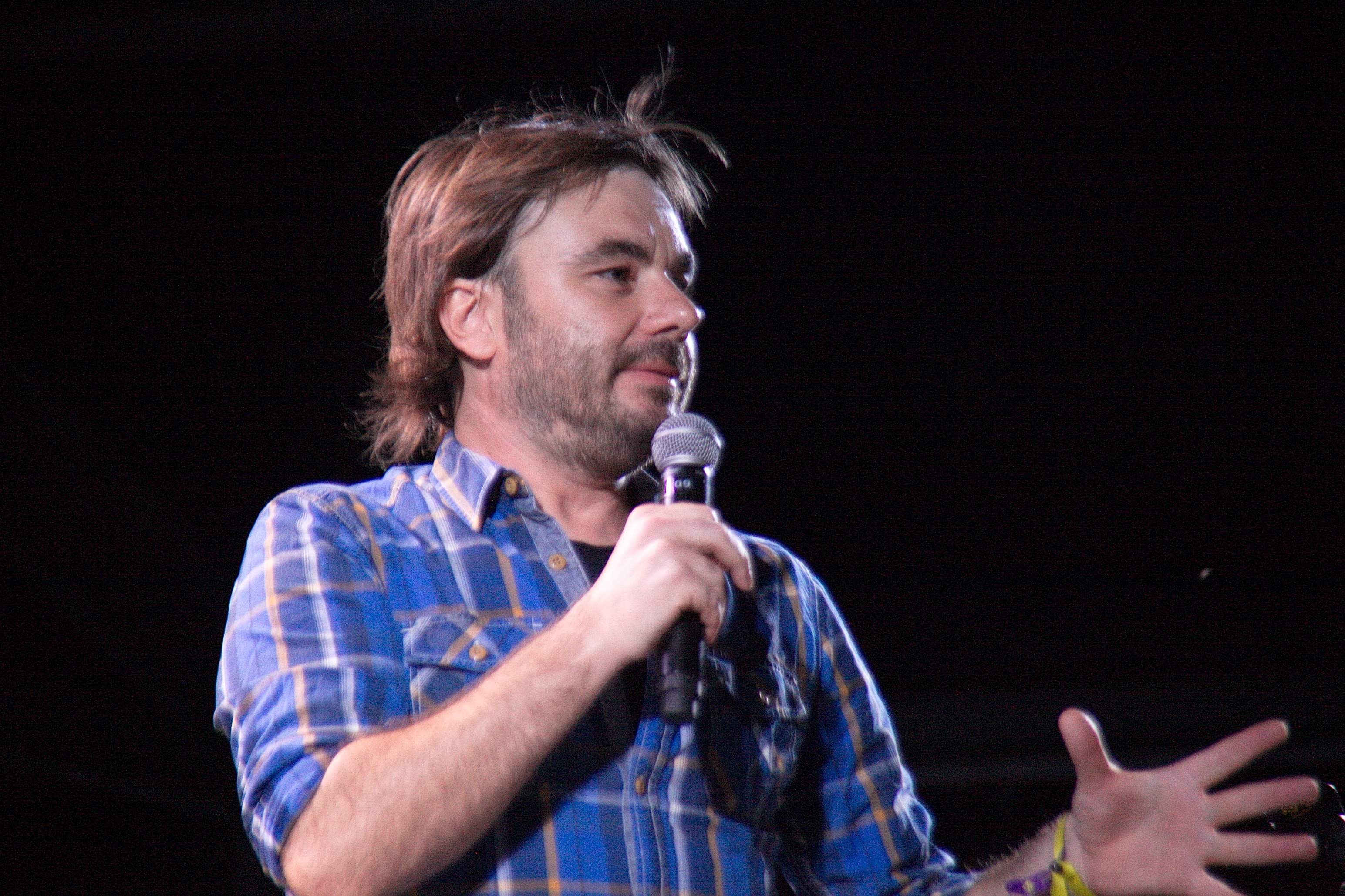 L'actor Quim Masferrer fent el pregó de la Festa Major de L'Ametlla del Vallès de 2016.